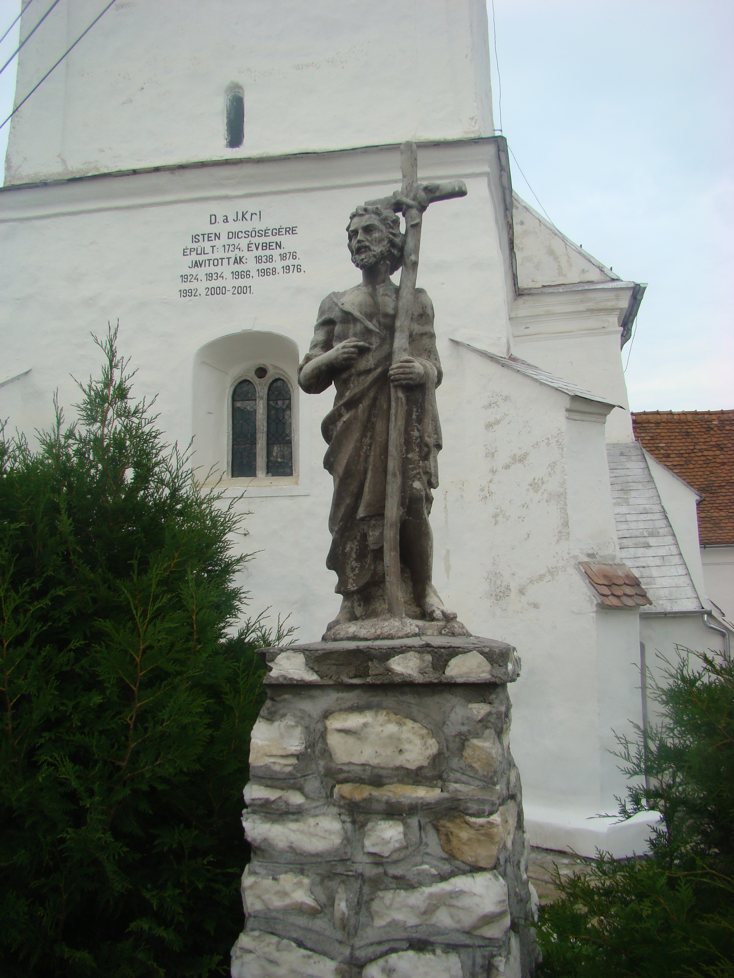 Valea Strâmbă, Harghita